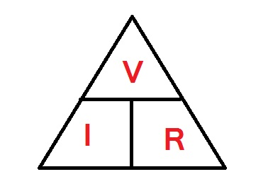 மின் அழகு